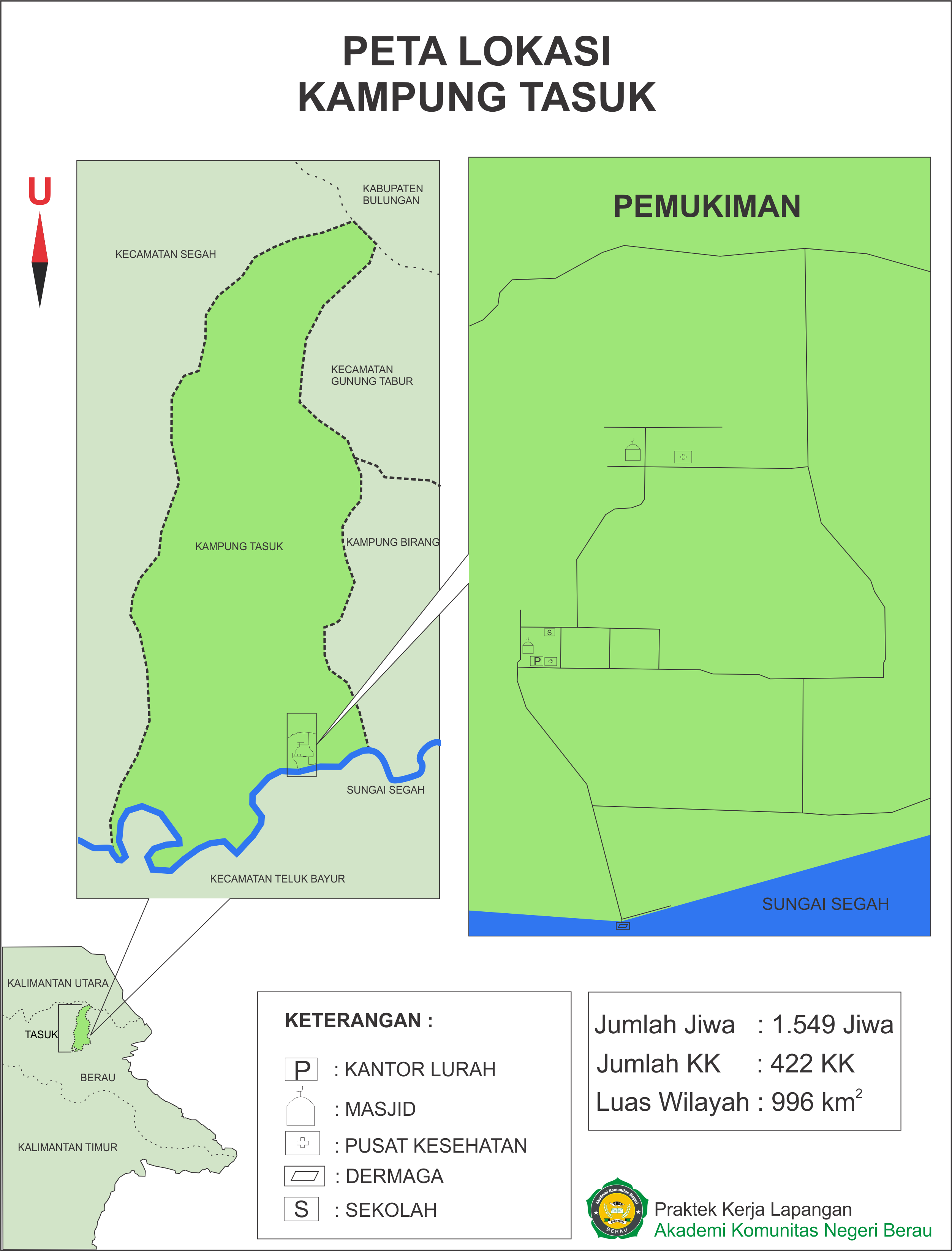 Sketsa Peta Kampung Tasuk